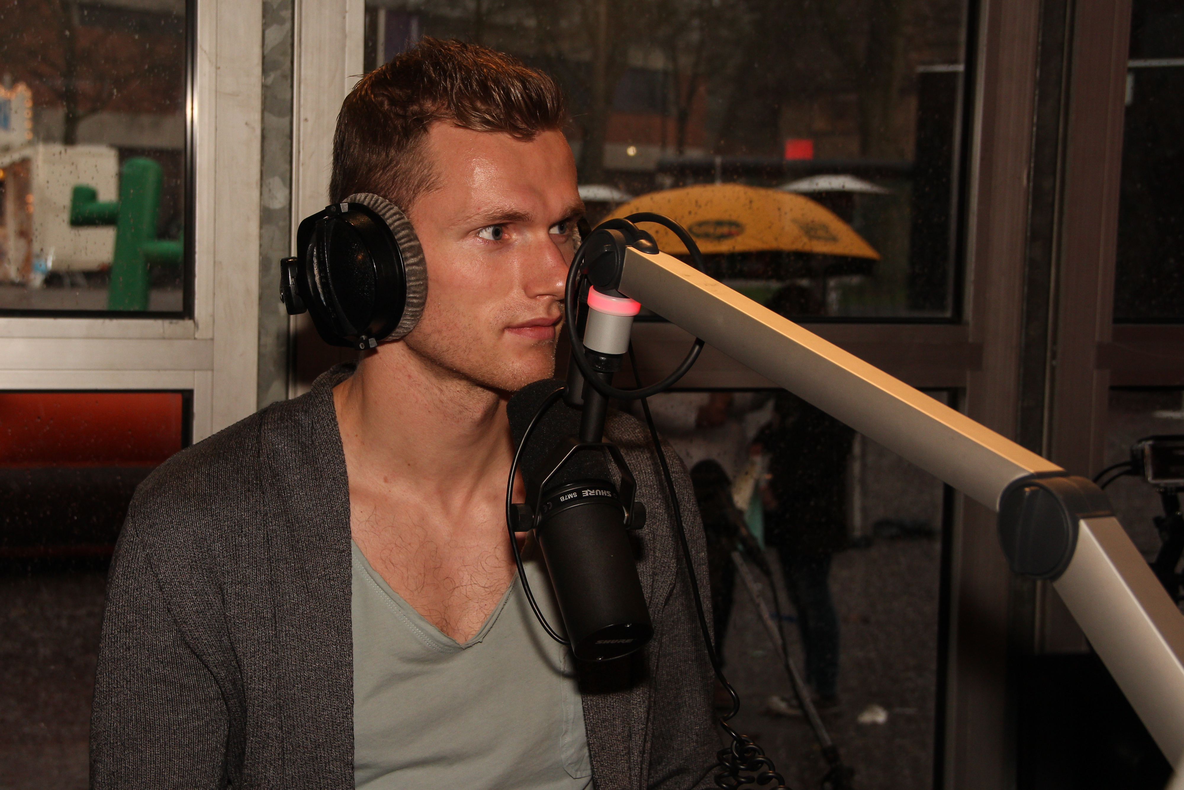 Voetballer Tim Siekman van FC tijdens het Glazen Huis Emmen 2014